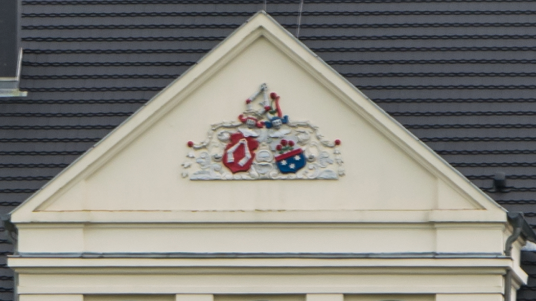 Schloss Wichmannsdorf Wappen der Familien von Oerzen und Schröder (Hamburger Bankiers)